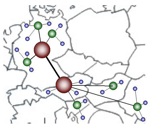 Mehrnaben-Netz in der Logistik